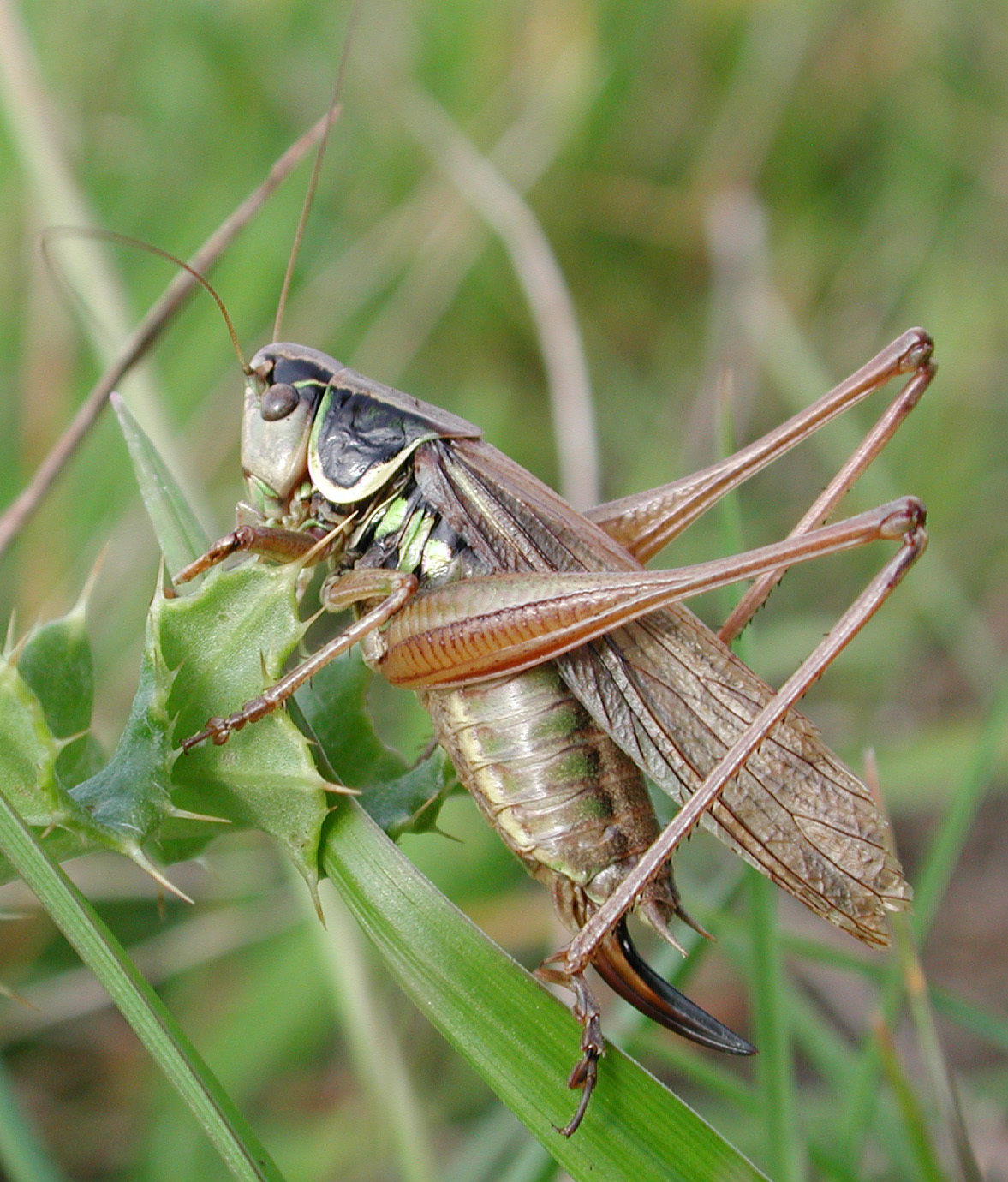 Metrioptera Roeselii forma diluta, f., Roesels Beißschrecke, langflügelige Form, NSG Kirchwerder Wiesen, Elbmarsch bei Hamburg, Deutschland